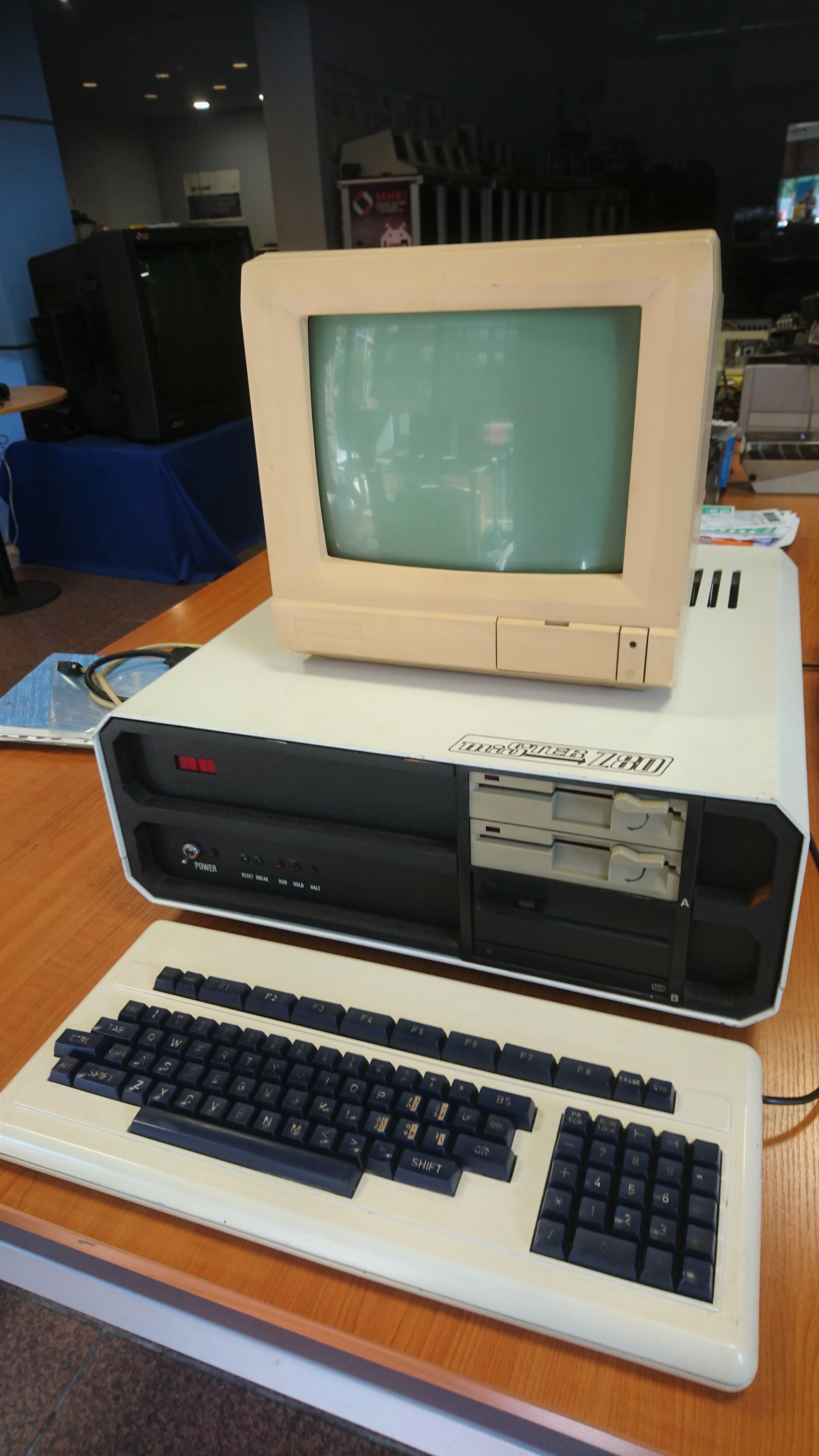 Mikrokomputer MiSter Z80 Sterownik Mikroprocesorowy model OM 1